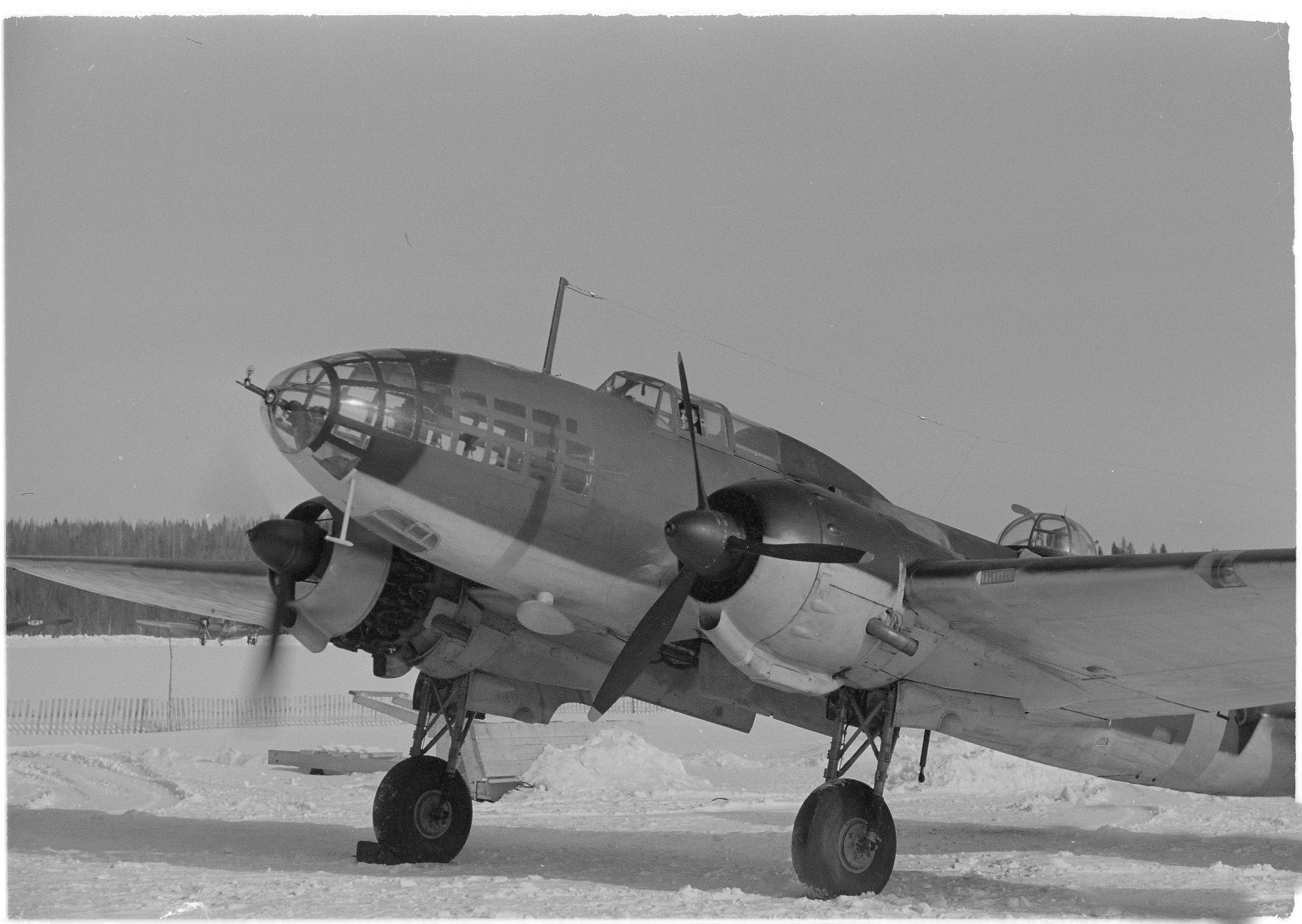 DF-kone edestä. (Venäläinen DB 3 f pommituskone) (Kuvassa on Iljushin DB-3F (Il-4)). Kuvauspaikka: Luonetjärven lentokenttä